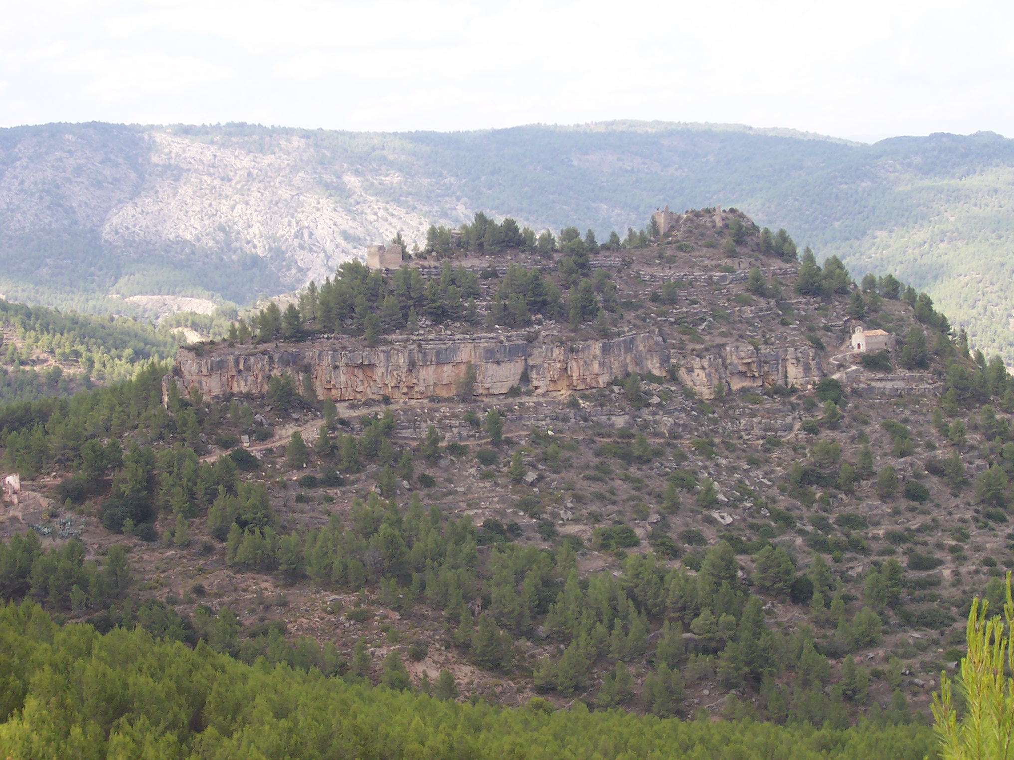 VISTA GENERAL DEL CASTILLO DE ARENÓS DESDE CTRA. LOS CALPES